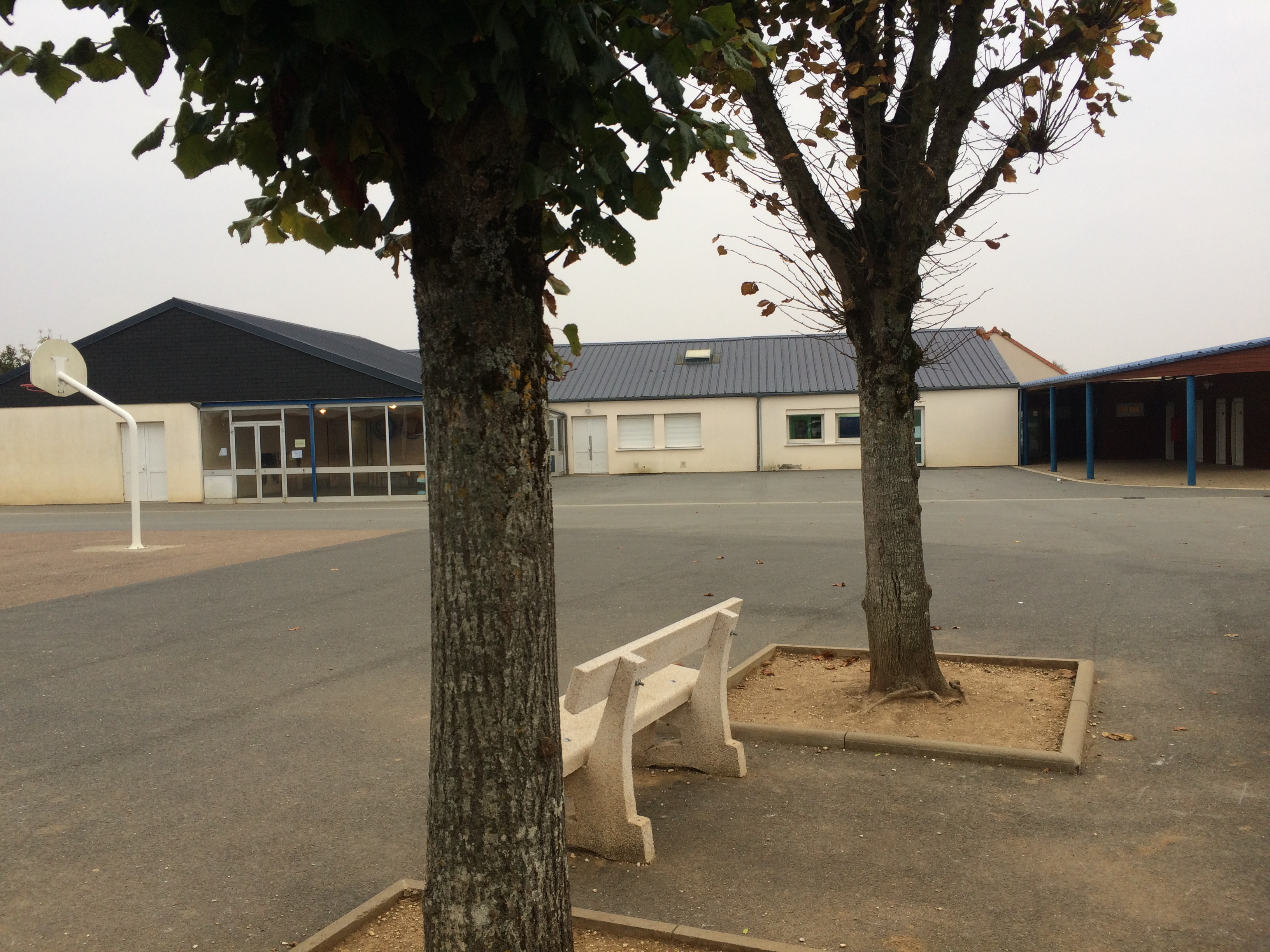 Cour et bâtiments de l'école Route de Châteauneuf 18570 Trouy